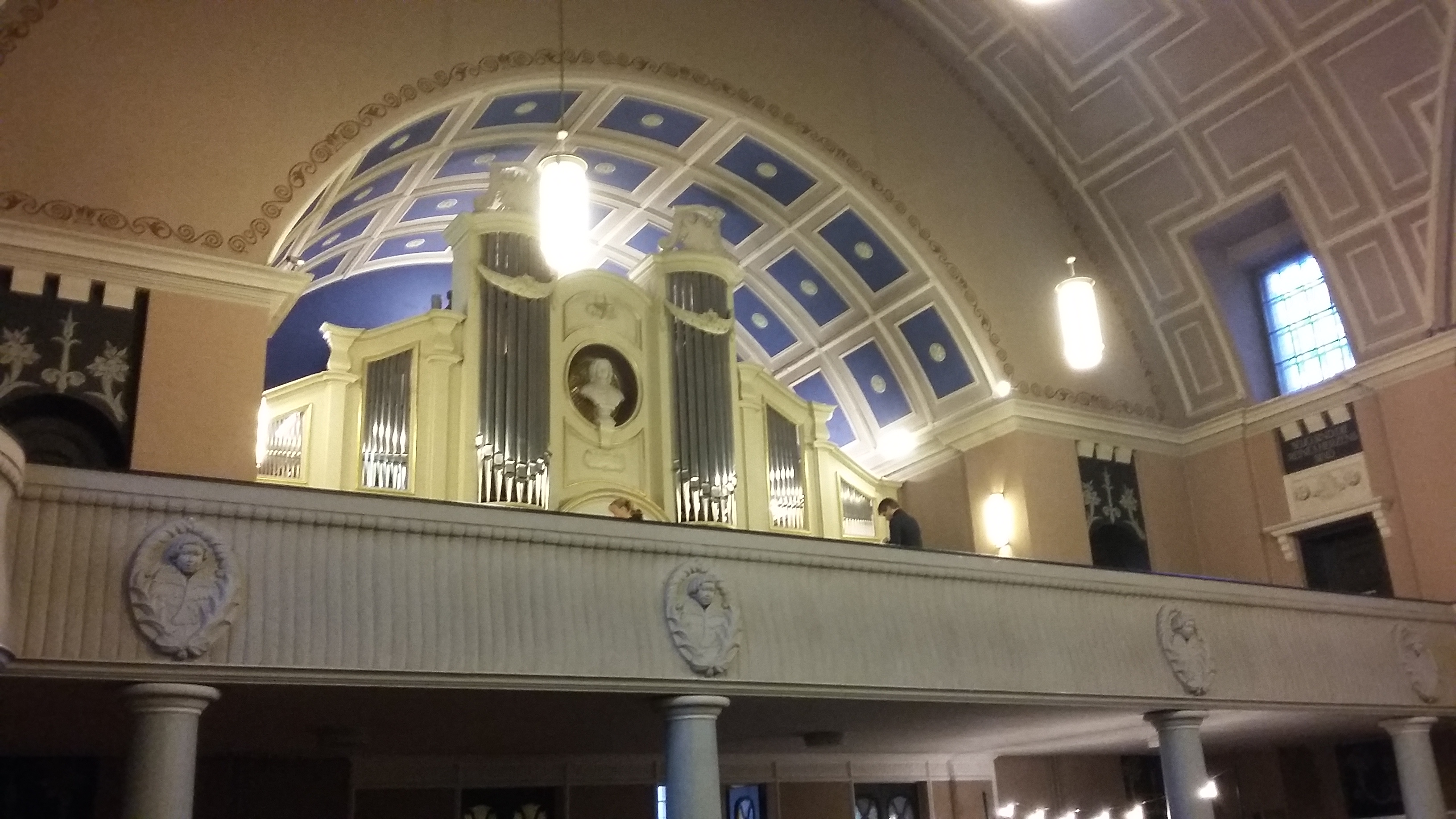 Hoffnungskirche Pankow Orgelempore